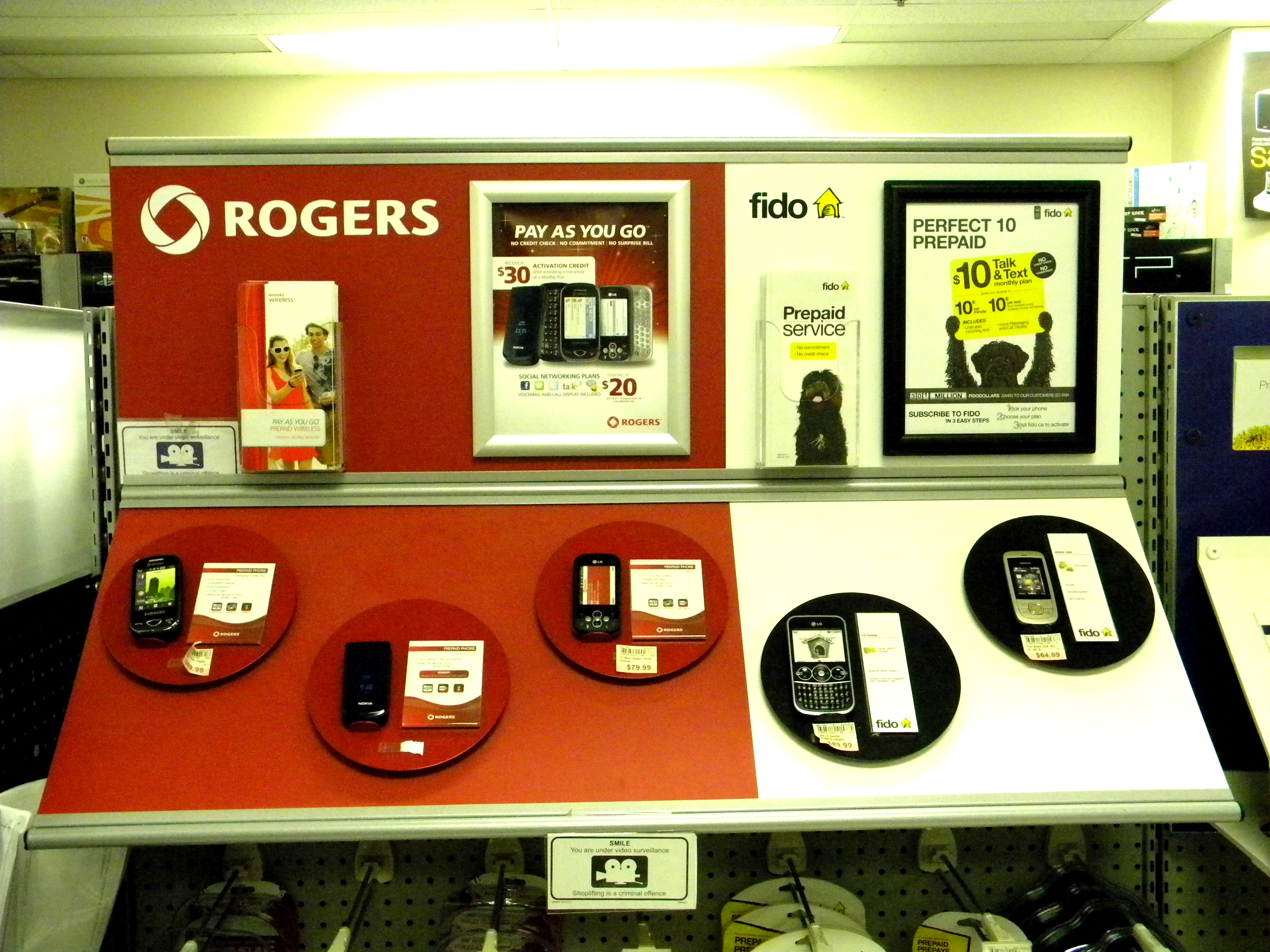 Affichage des télépĥones prépayés Rogers et Fido chez Zellers.